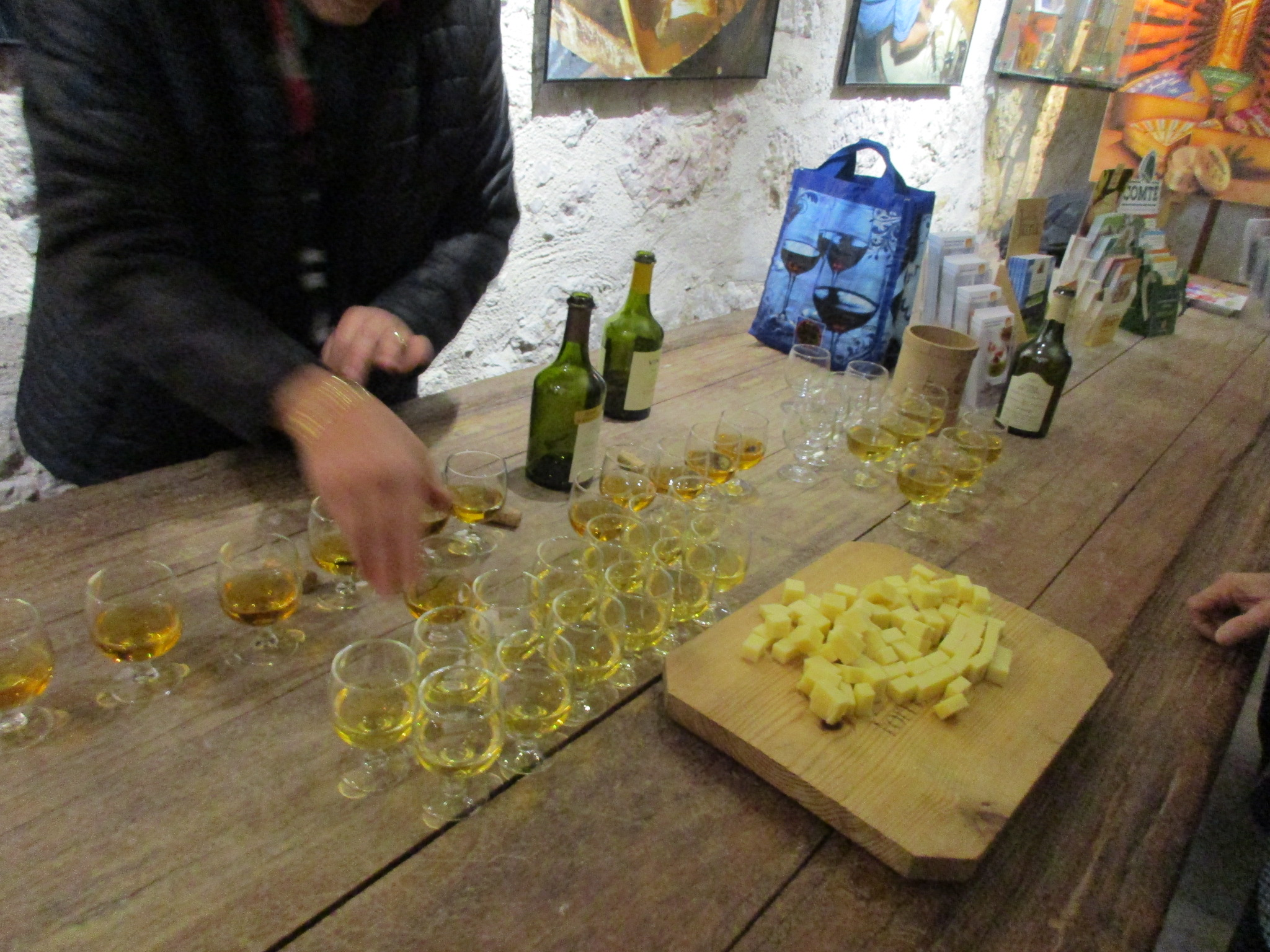 Dégustation de comté et vin jaune, dans les caves d'affinage Juraflore du Fort des Rousses